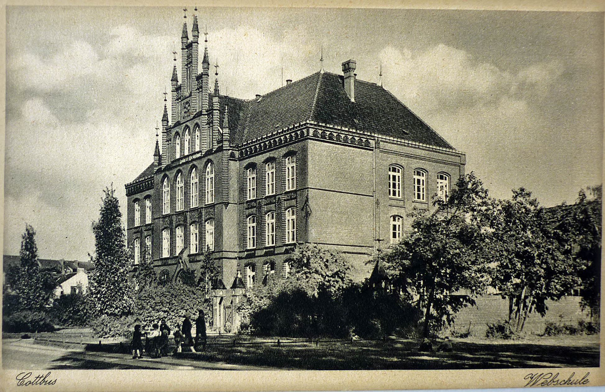 Cottbus, Webschule (alte Postkarte)